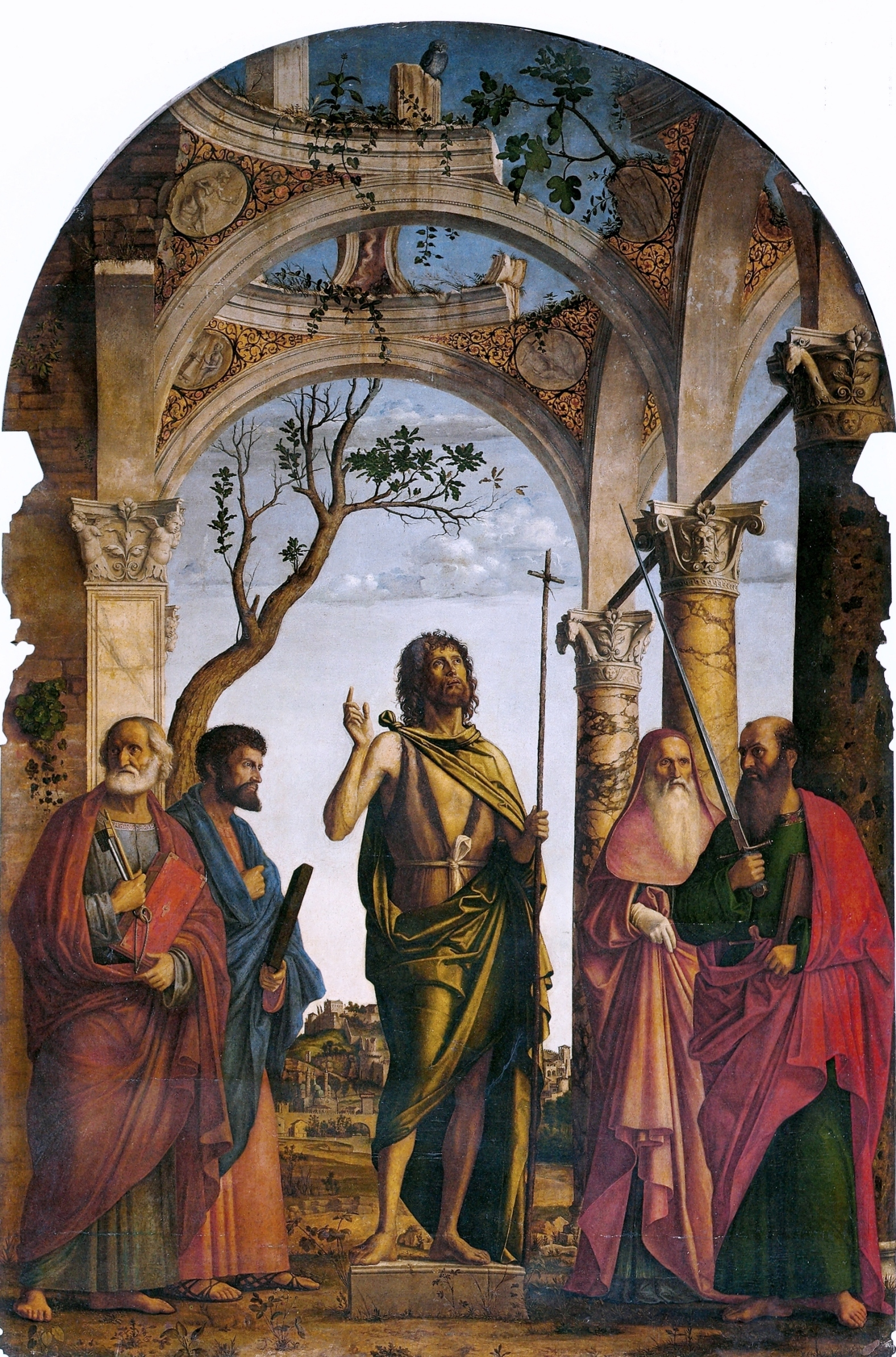 itlabel QS:Len,"St John the Baptist with Saints" label QS:Lde,"Johannes der Täufer mit den Heiligen Petrus, Markus, Hieronymus und Paulus"